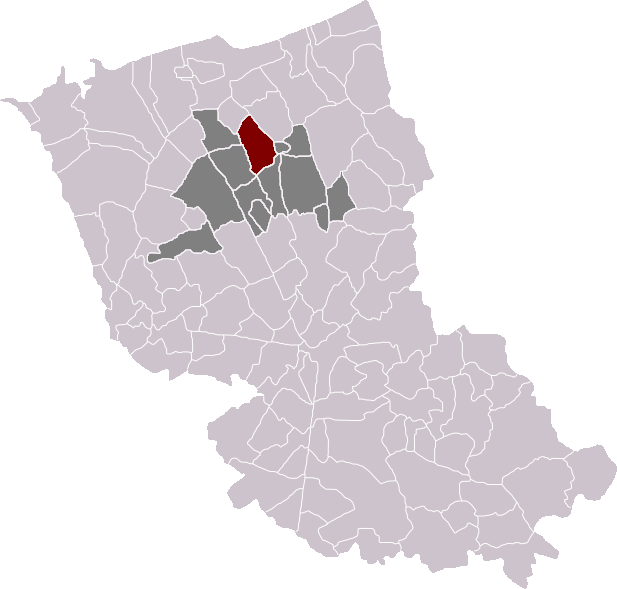 Locatie gemeente Bieren in arrondissement Duinkerke. Zelfgemaakt. Location of Bierne municipality in the arrondissement of Dunkirk. Self made. Localisation de la commune de Bierne dans l'arrondissement de Dunkerque. Fait moi-même.